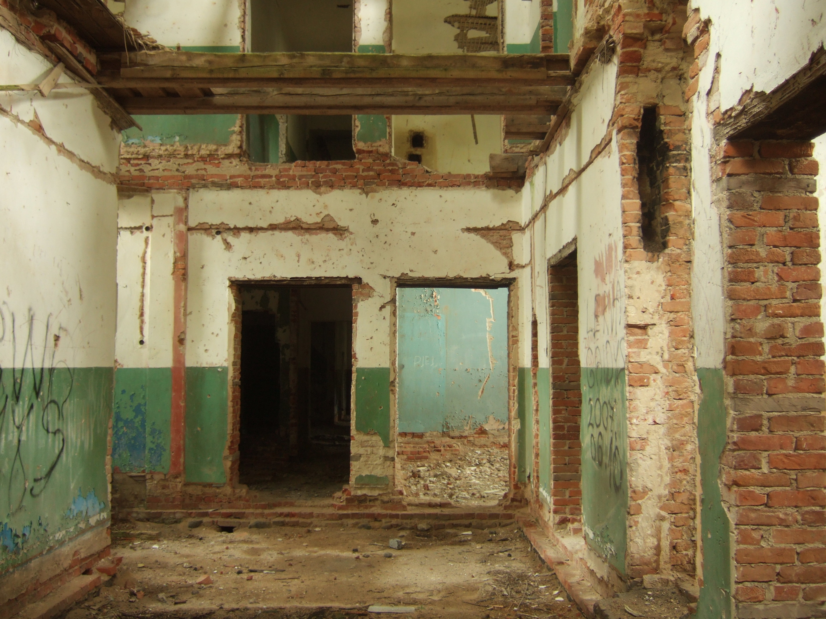 Laukžemės dvaro išlikęs interjeras